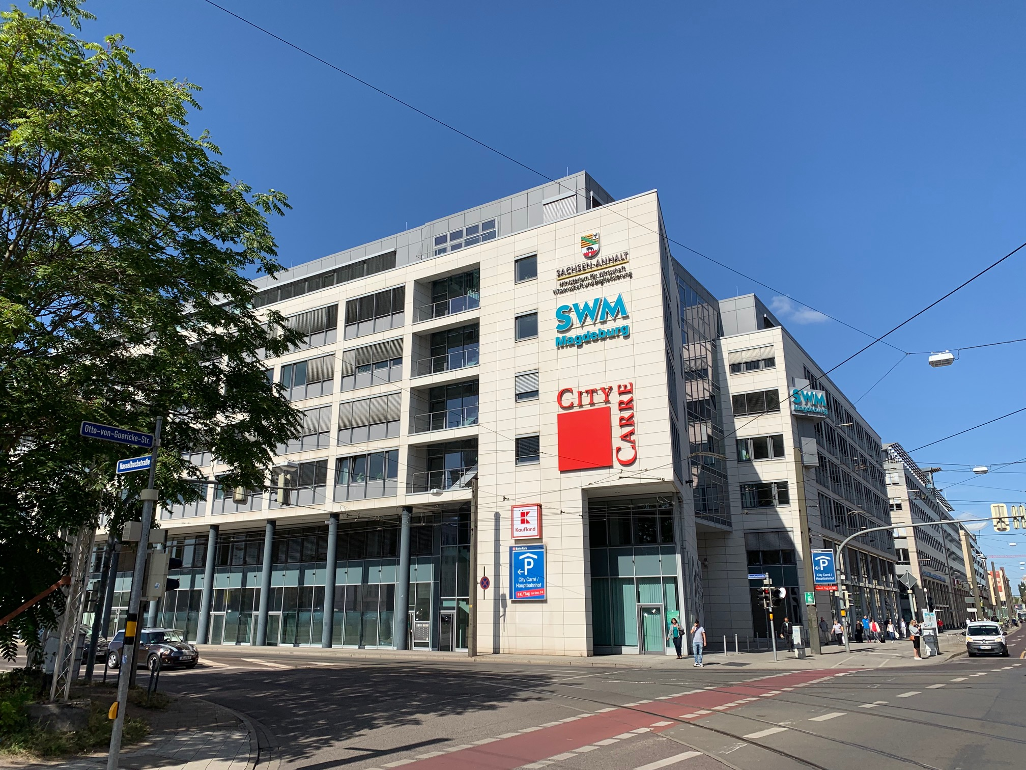 Außenansicht vom Ministerium für Wirtschaft, Wissenschaft und Digitalisierung Sachsen-Anhalt.